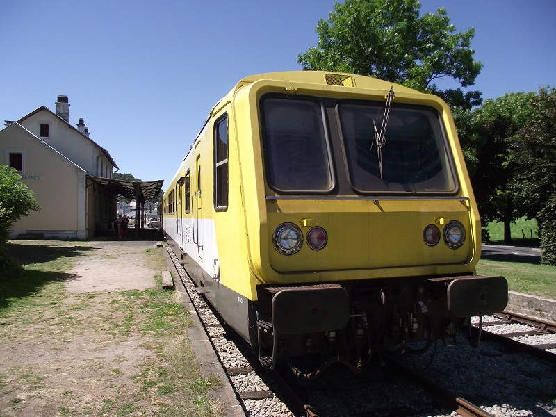 Le Gentiane Express en Août 2013